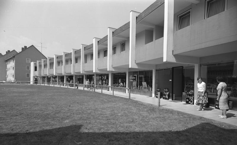 Wohnungsbau: Nürnberg-Zollhaus